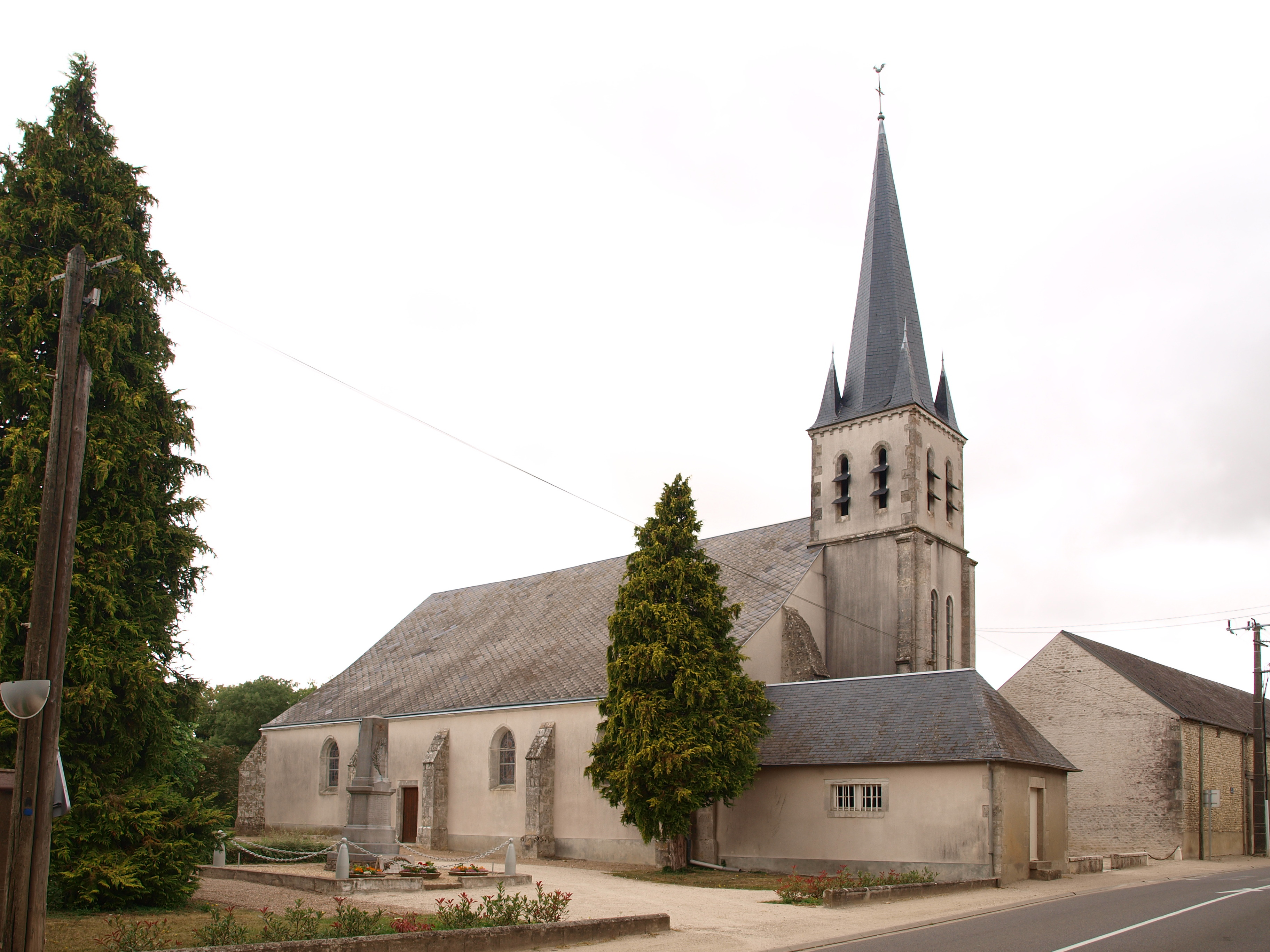 Saint-Péravy-la-Colombe (Loiret, France) ; église